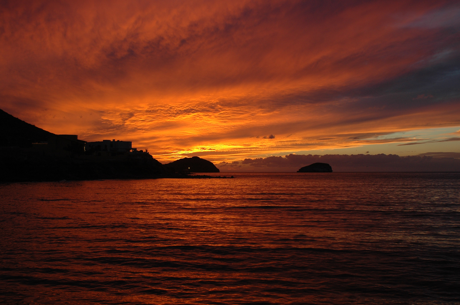 BELLO ATARDECER EN EL MUELLE